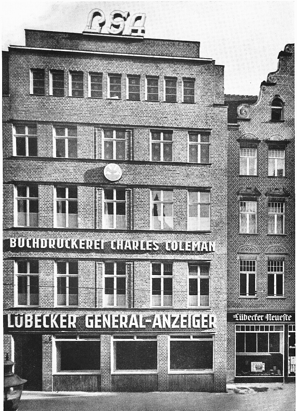 Königstraße 55, "Lübecker Genralanzeiger" und Buchdruckerei von Charles Coleman, 1929 (abgerissen 1992)